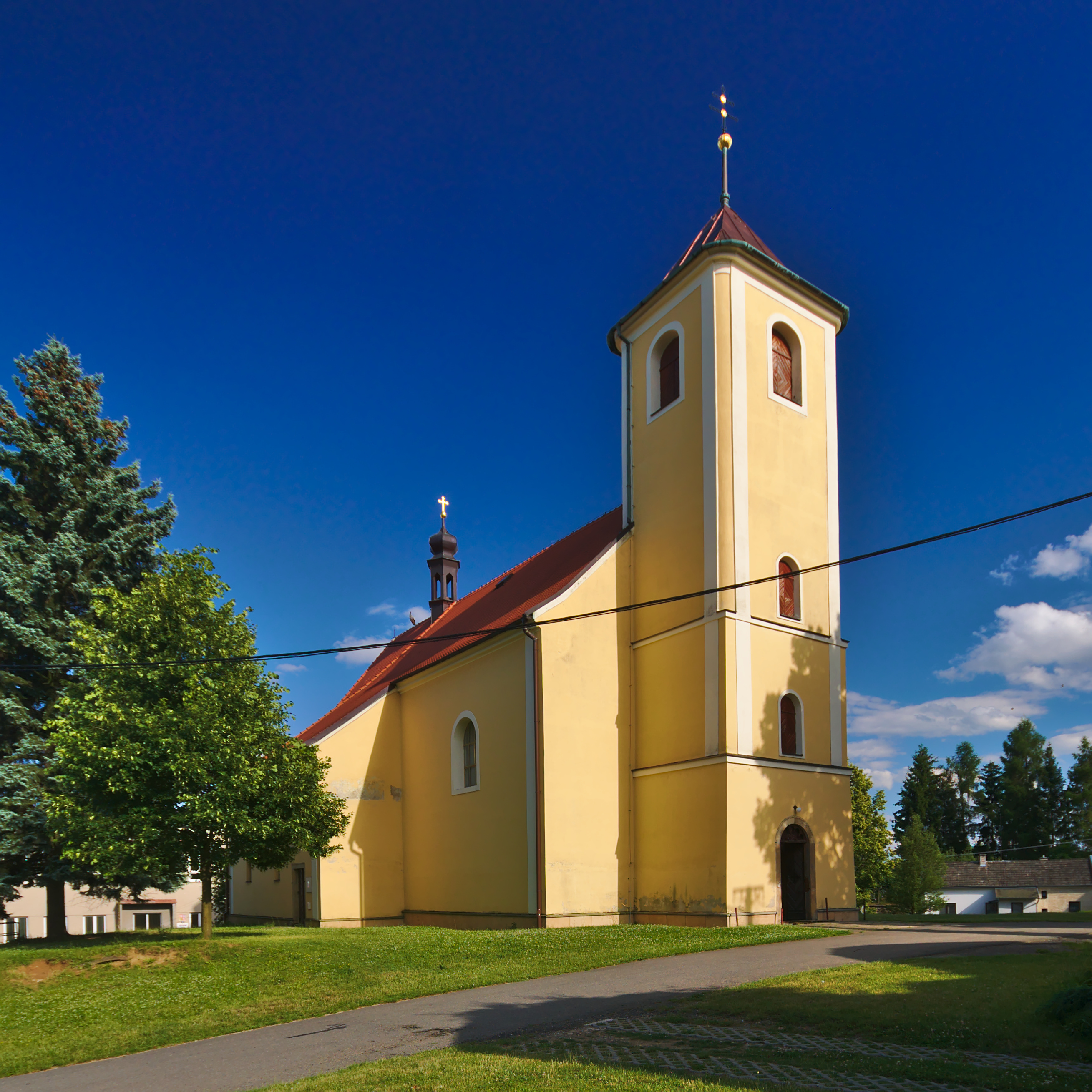 Kostel svatého Bartoloměje, Bohuslavice, okres Prostějov